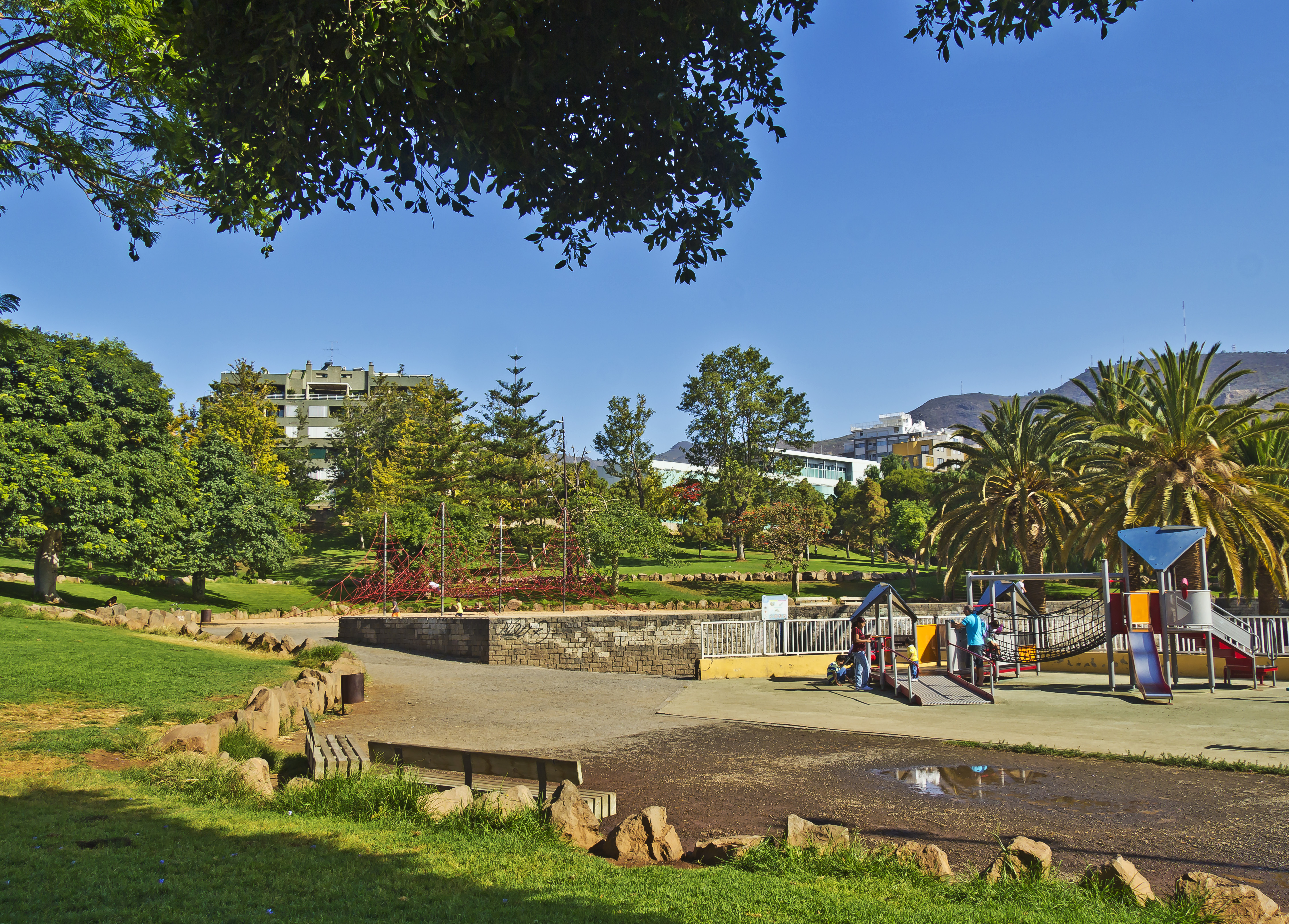 Der Parque La Granja liegt im Südwesten der Innenstadt von Santa Cruz de Tenerife